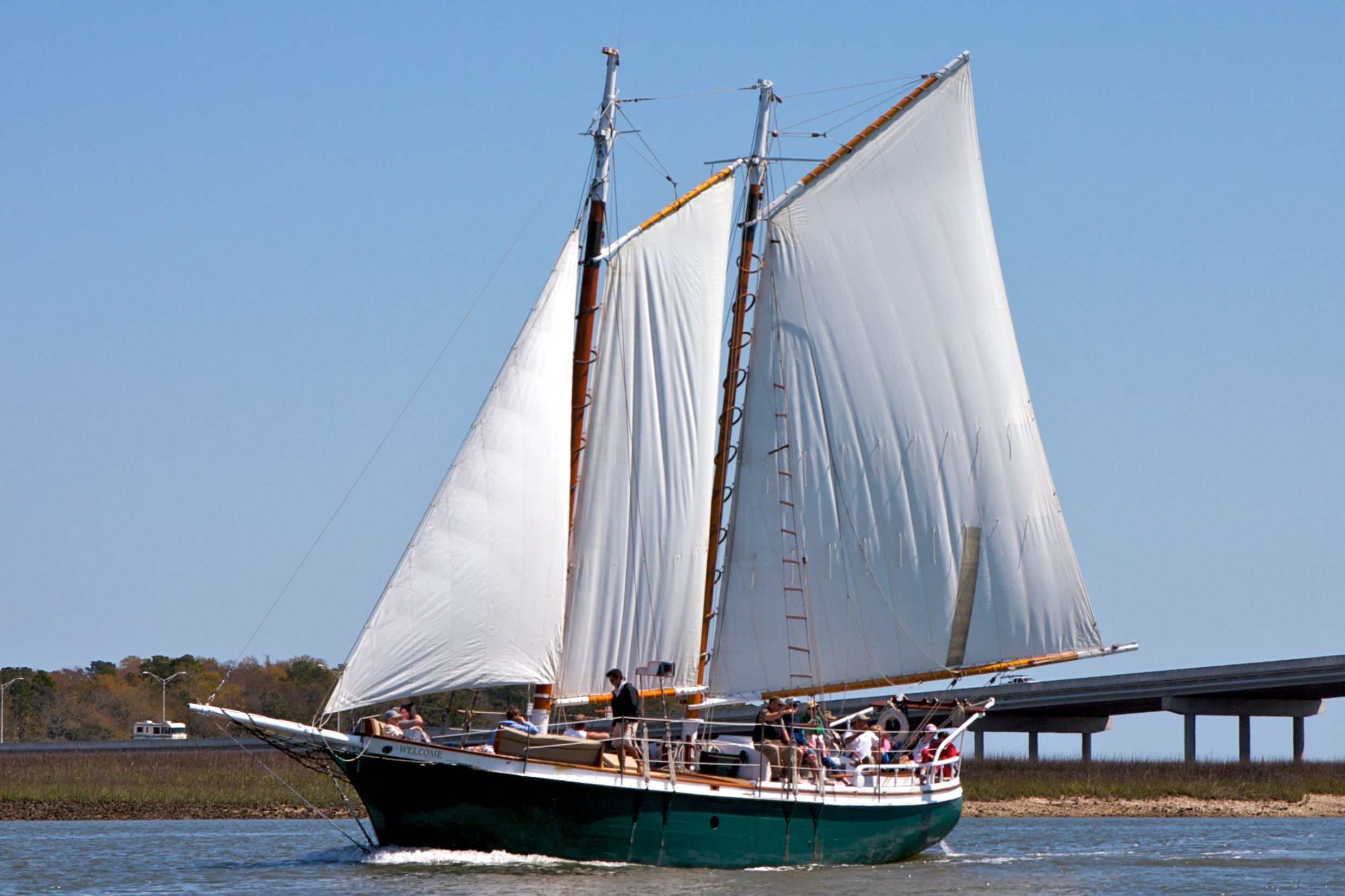 Le schooner Welcome